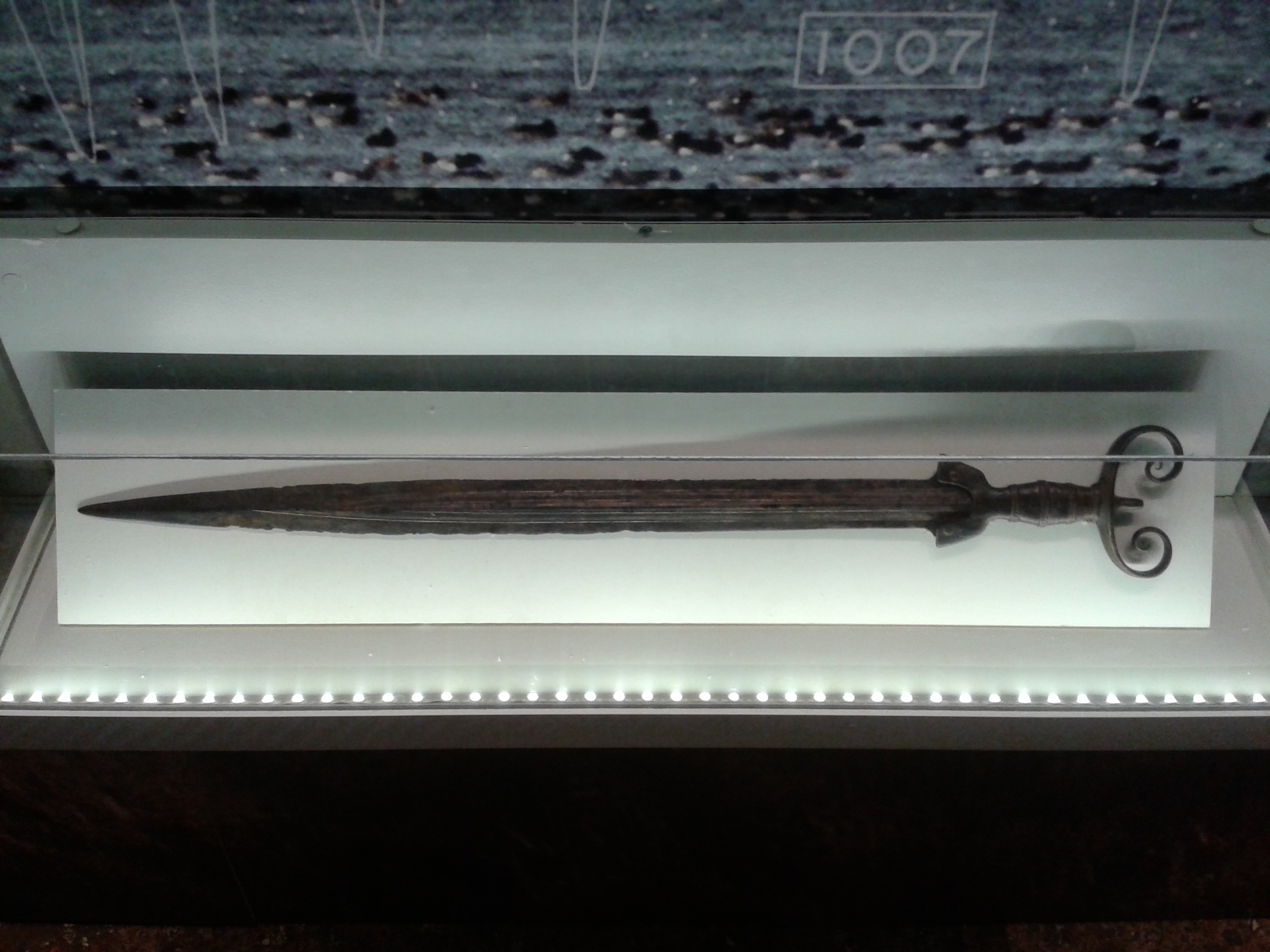 Spada “ad antenne” rinvenuta a Casier, IX-VIII sec. a.C. conservata al Museo Civico di Treviso